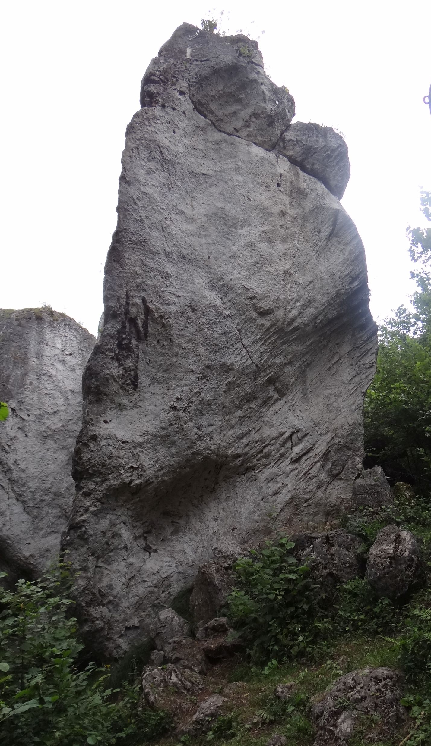 Skała Mama na wzniesieniu Kołaczyk w Podlesicach